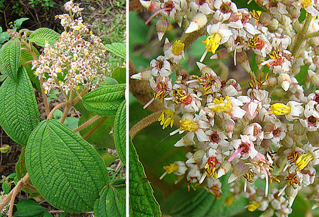 From Volcan Baru, western Panama.